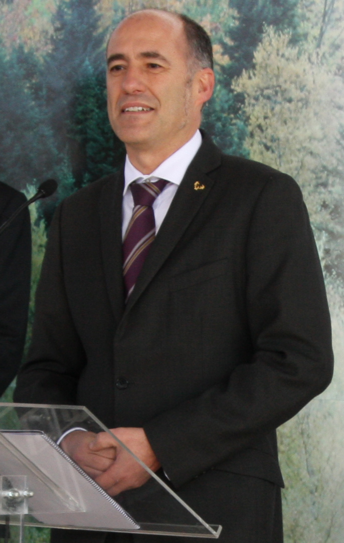 Iñaki Goirizelaia hitzaldi batean